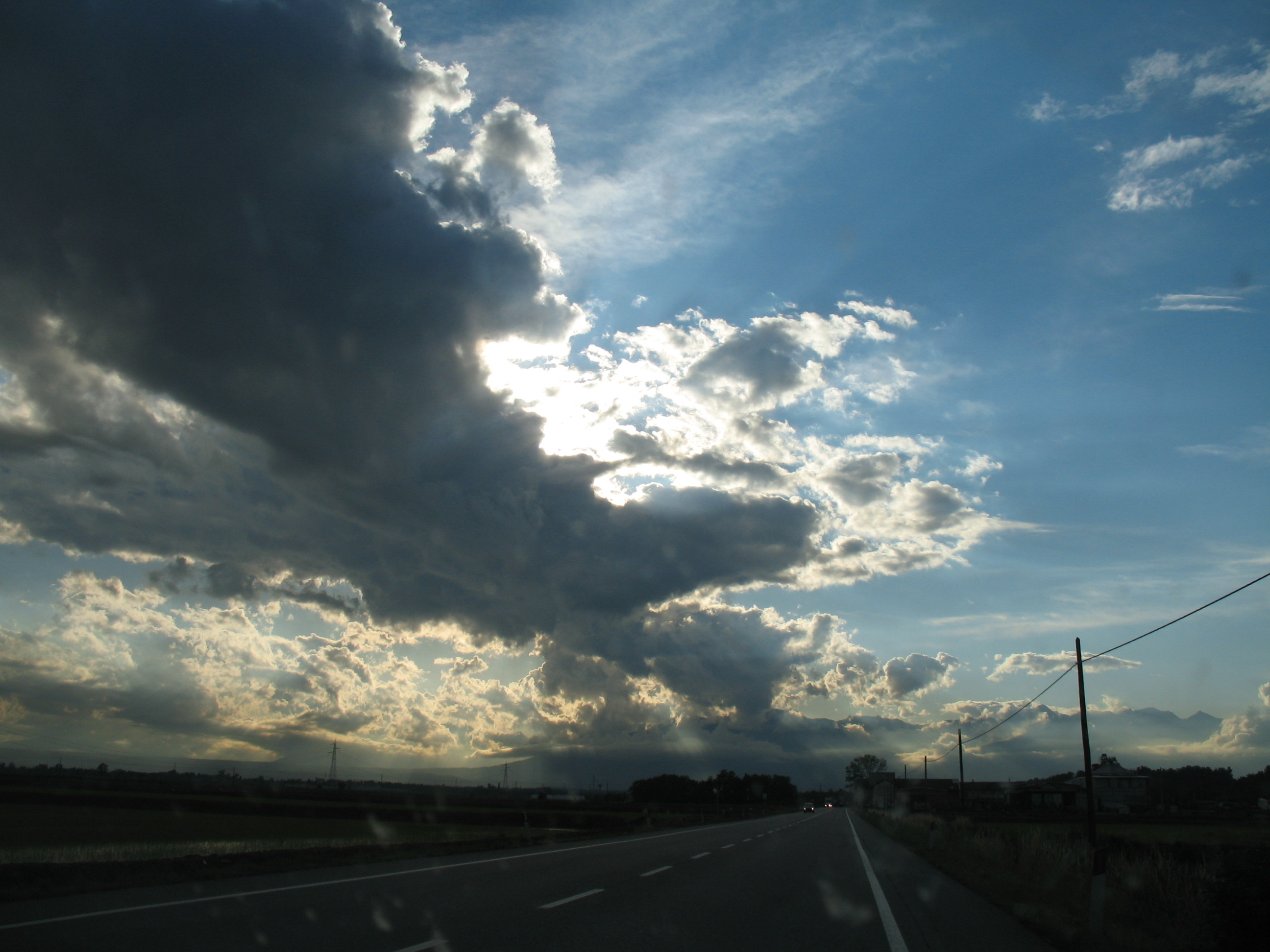 Immagine da Biella